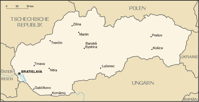 Karte Slovakei, von Benutzer:Head übersetzt CIA World Factbook